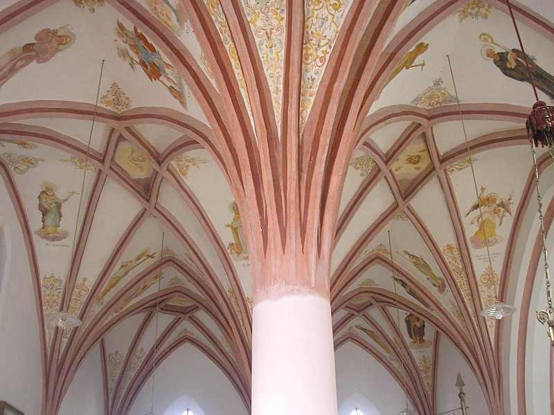 St. Leonhard (Fürstenfeldbruck, Oberbayern). Gewölbe im Langhaus. Eigene Aufnahme, Jan. 2007 / St. Leonhard (Fürstenfeldbruck, Upper Bavaria, Germany). The vaulting of the nave. Own photo, Jan. 2007